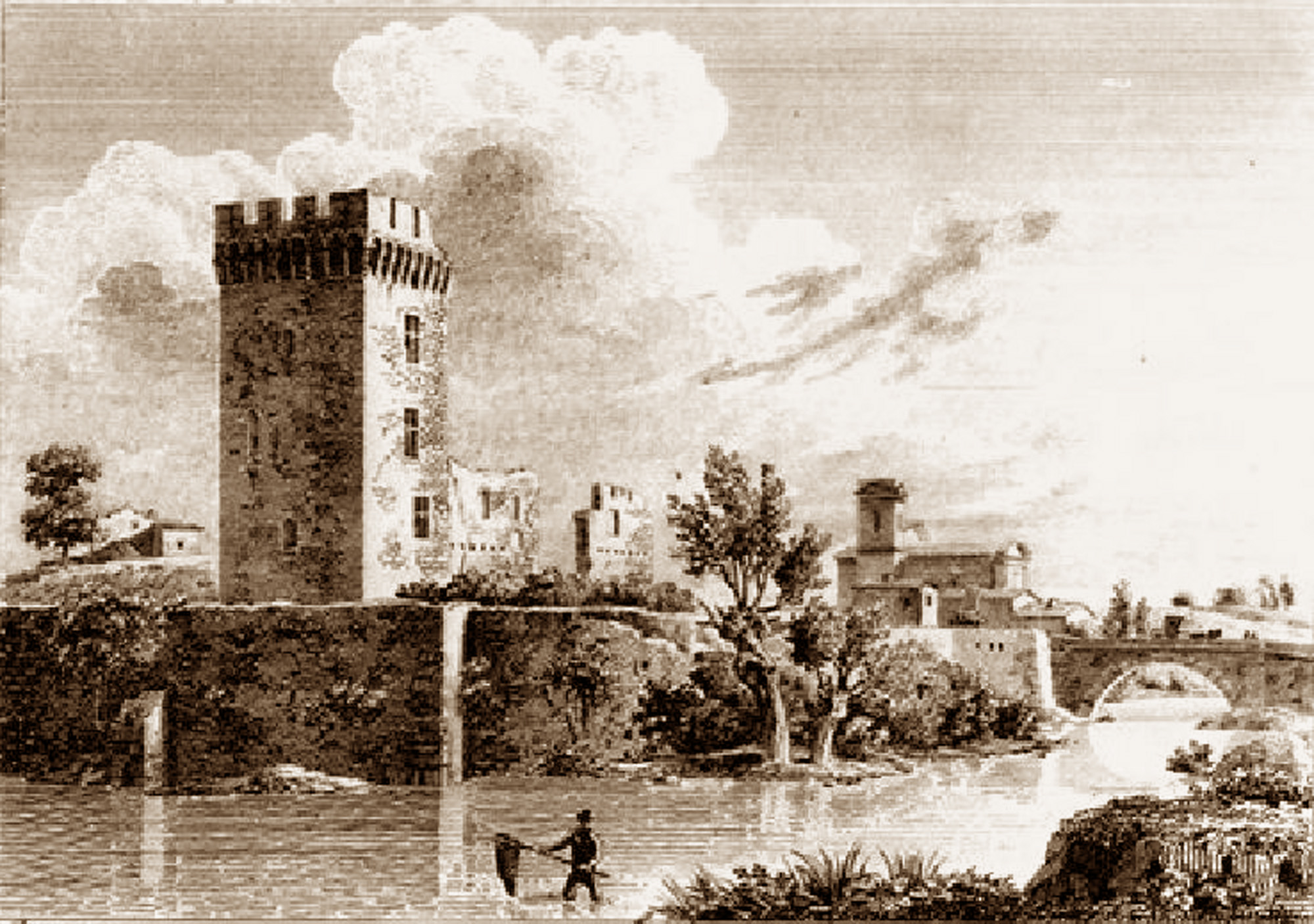 Palais des papes de Sorgues Gravure de Jean-Jérôme Baugean